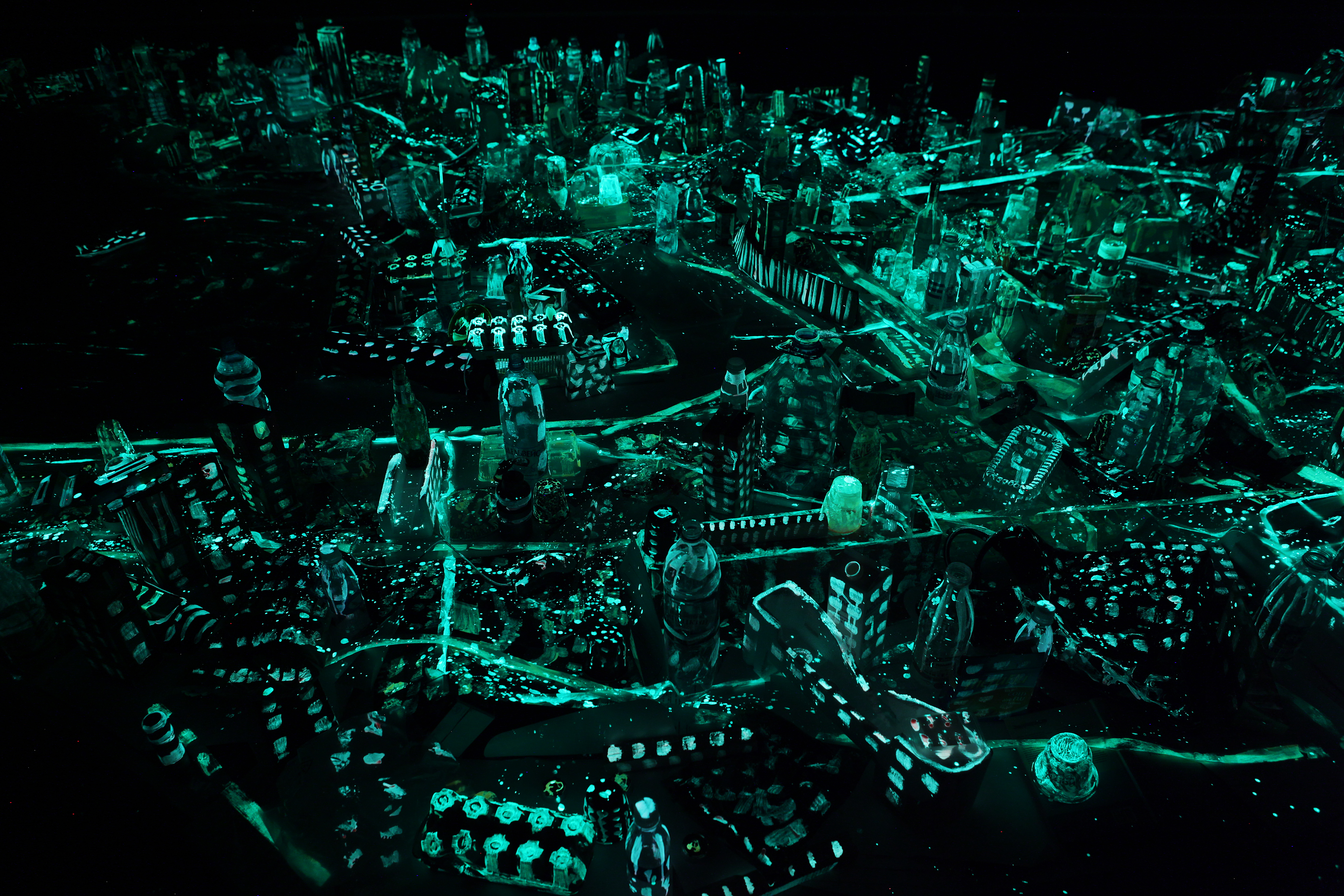 "Метрополис"